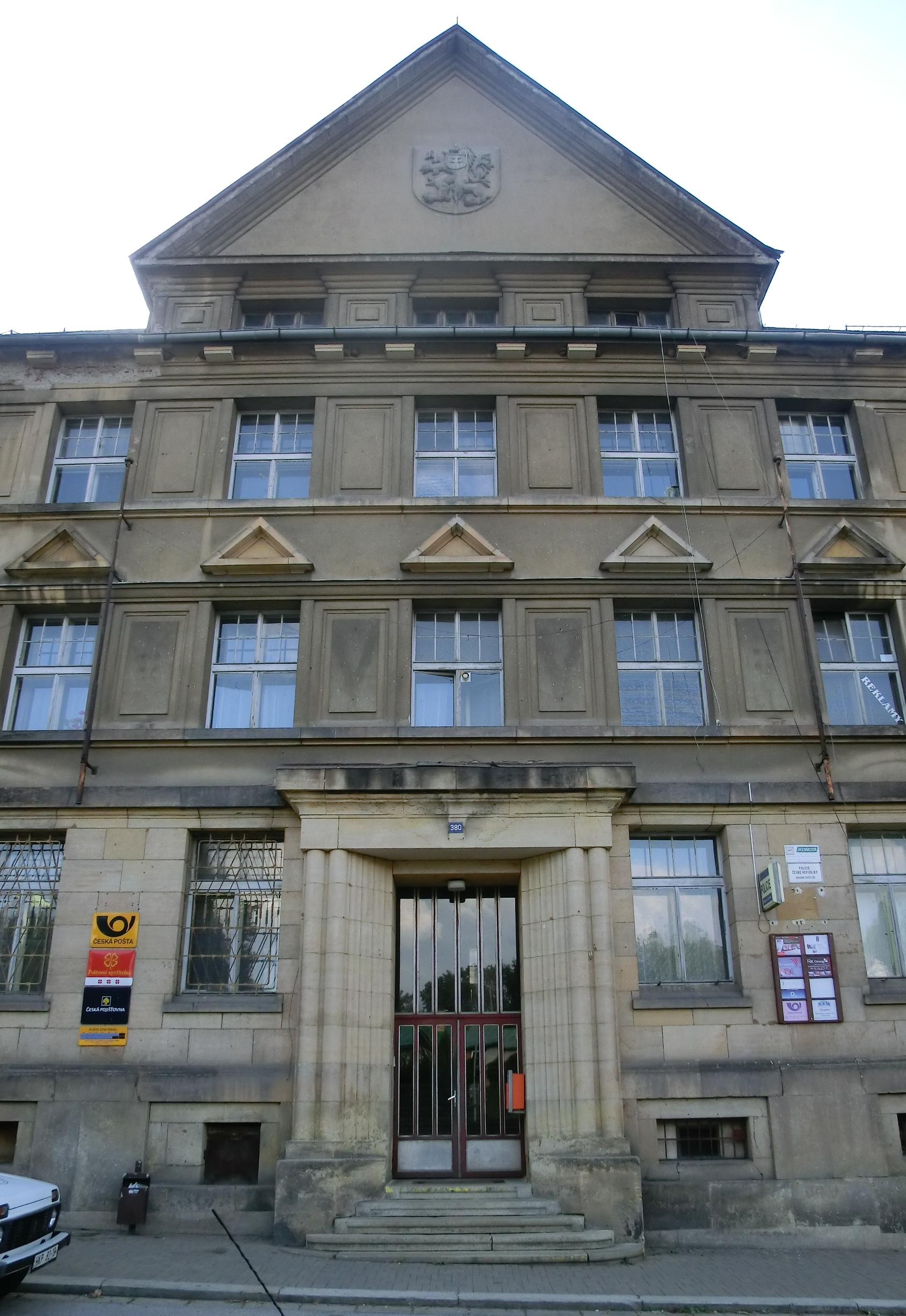 Budova pošty (bývalého Okresního soudu) v Jilemnici - průčelí